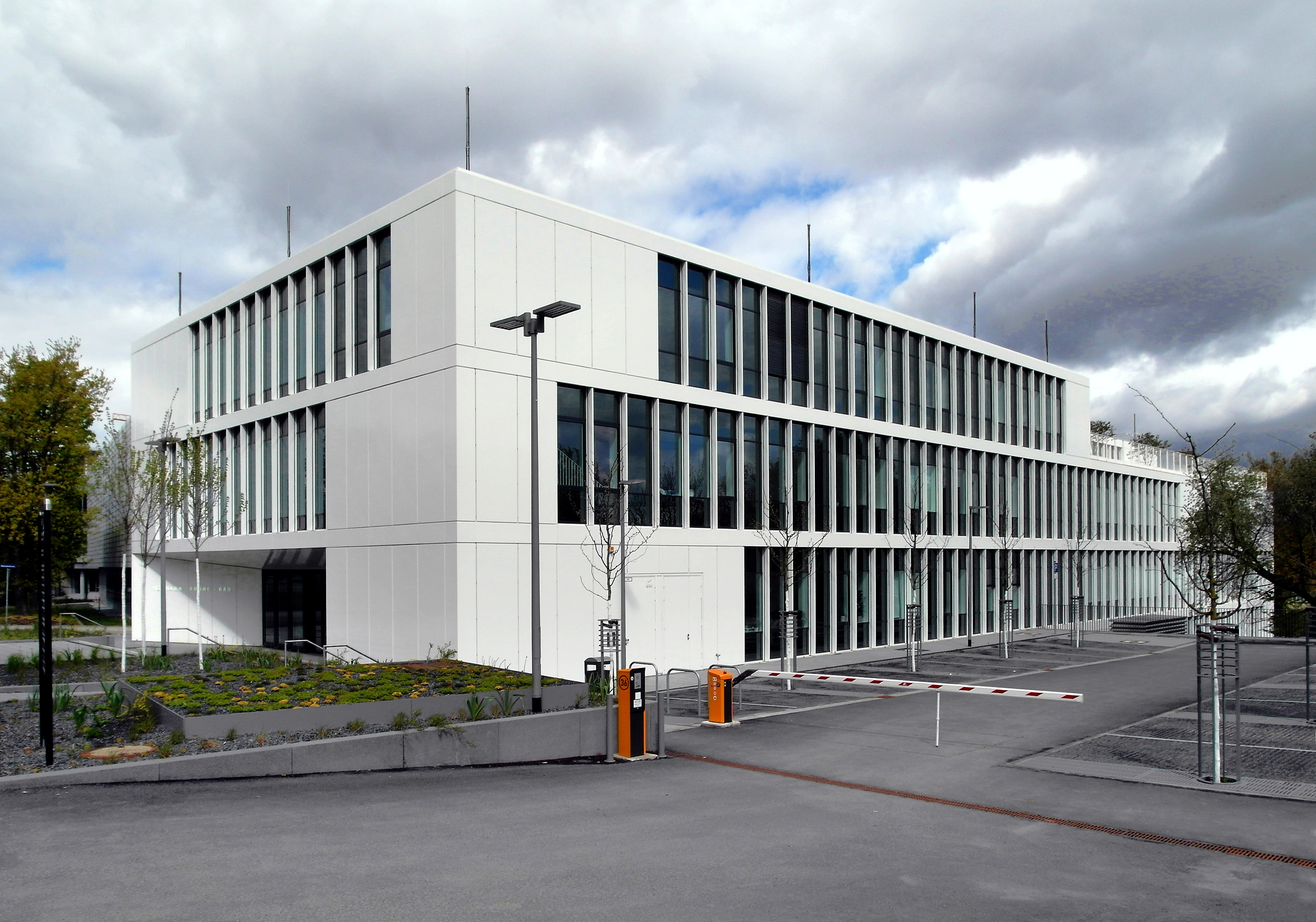 22.04.2017 01187 Dresden, Nöthnitzer Str. 61 / Ecke Helmholtzstraße (GMP: 51.025824,13.725607): SAM9344-9345.JPG: TU Dresden: HERMANN-KRONE-BAU (KRO). Erbaut 2016. Architekturplanung Freie Architekten Heinle, Wischer u. Partner, Dresden. Sicht von Süden. Institut für Angewandte Physik; IAPP - Dresden Integrated Center for Applied Physics und Photonic Materials; cfaed Nanomlabs - Center for Advancing Electronics; Dresden Nano-structuring labs; Hermann-Krone-Sammlung / Krone Collection. [SAM9344.JPG]20170422100DR.JPG(c)Blobelt